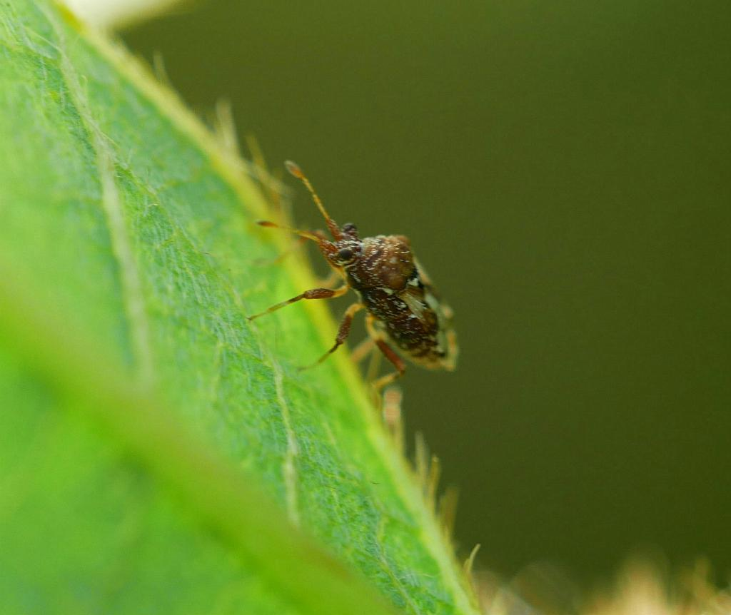 2019/09/09 和歌山県田辺市：Tanabe City. Wakayama Pref. Japan